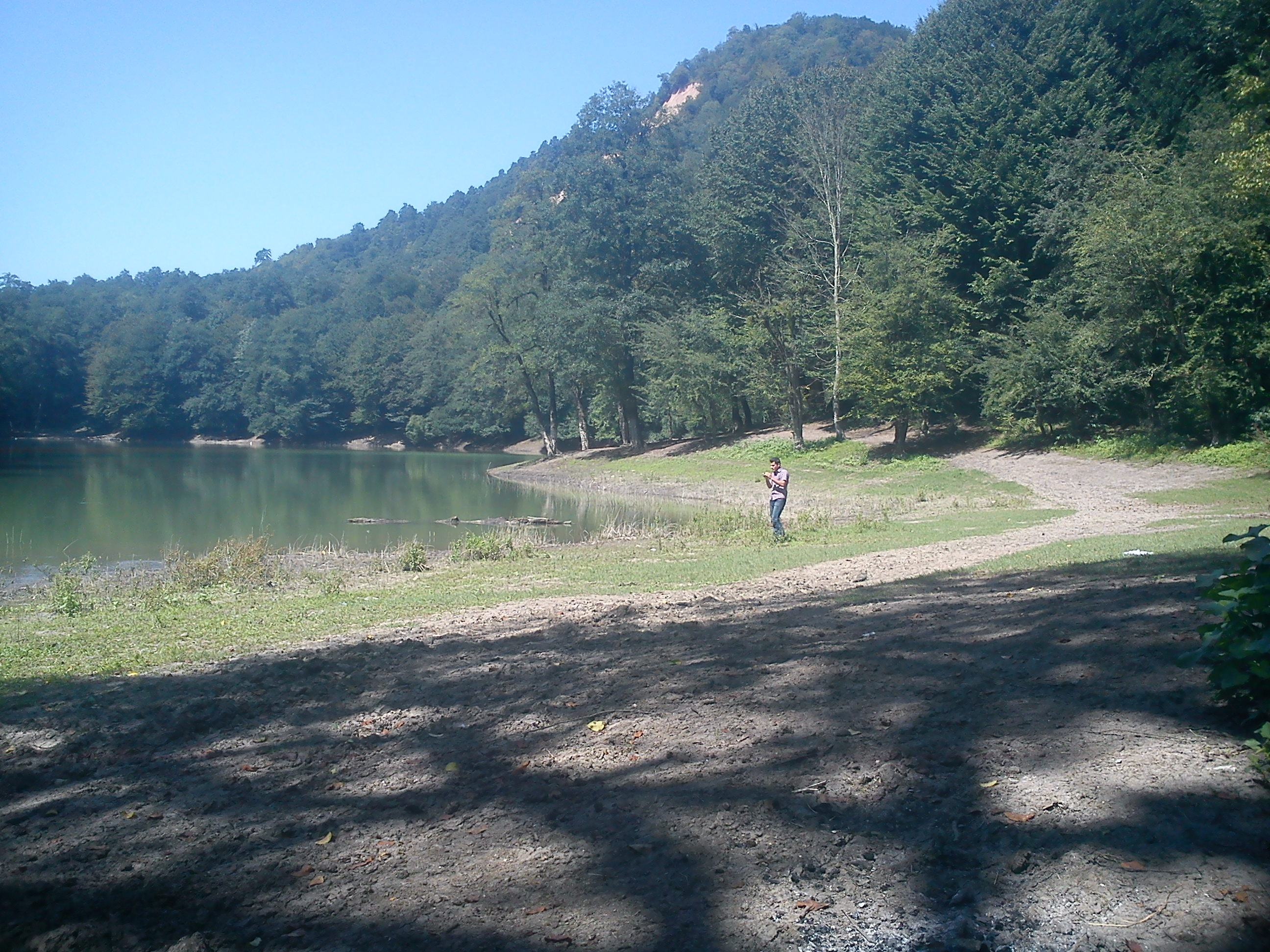 دریاچه‌ی میانشه در فصل کم‌آبی (مرداد 1392)